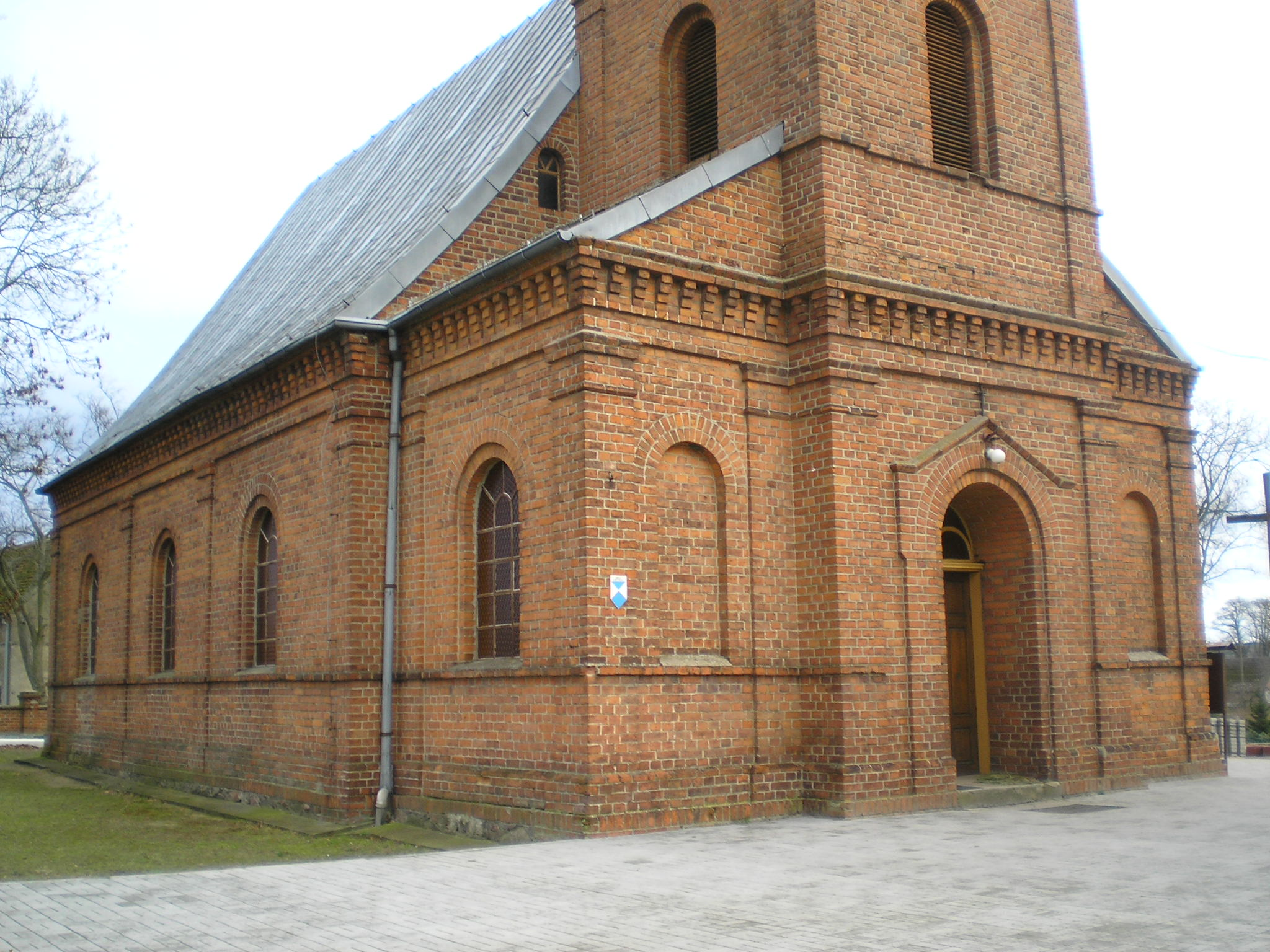 Zabytkowy Kościół pw. Matki Boskiej Różańcowej w Toporowie